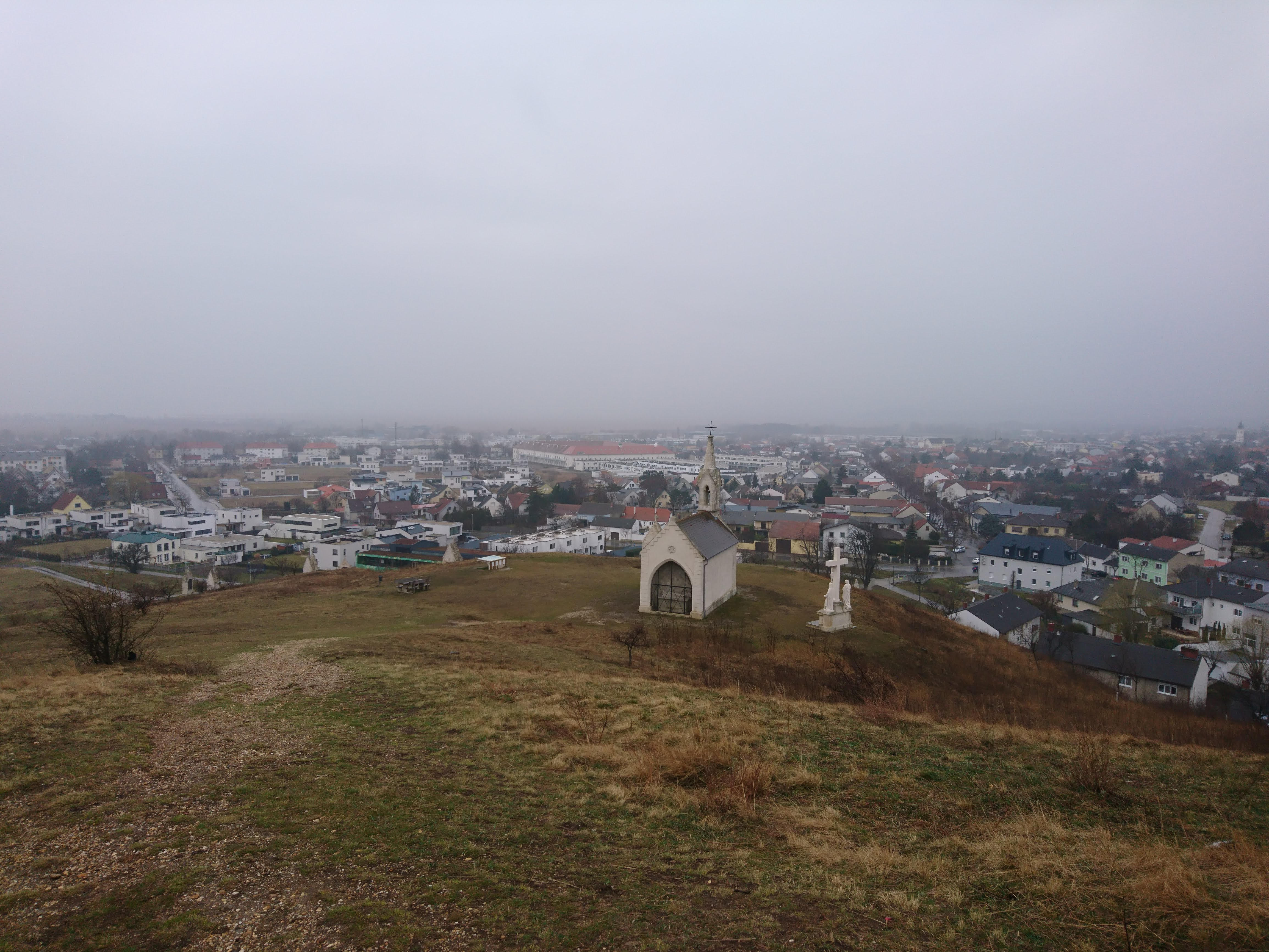 Kalvarieberg in Neusiedl am See